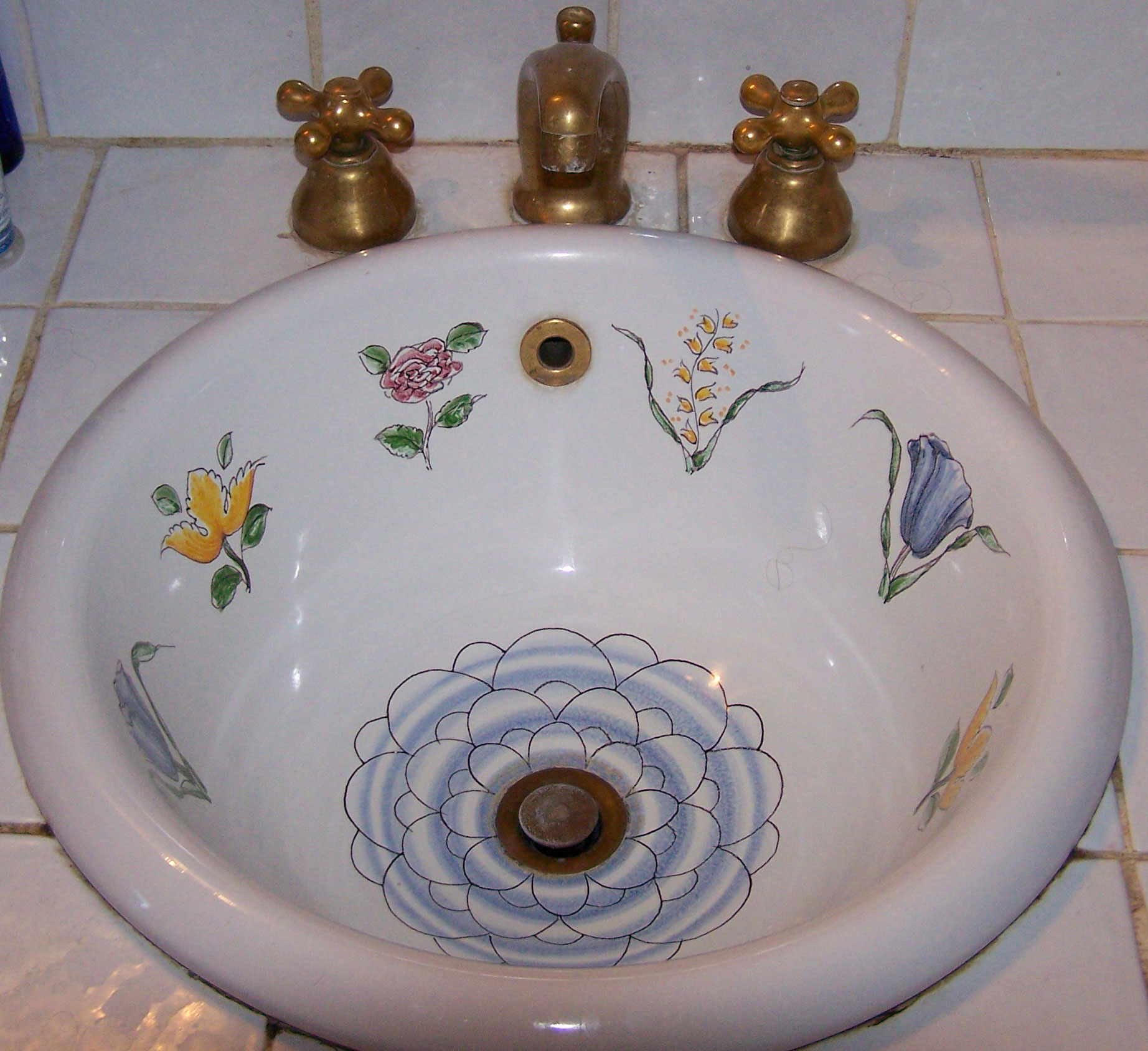 Un Lavabo del XIX secolo, riadattato e ristrutturato.